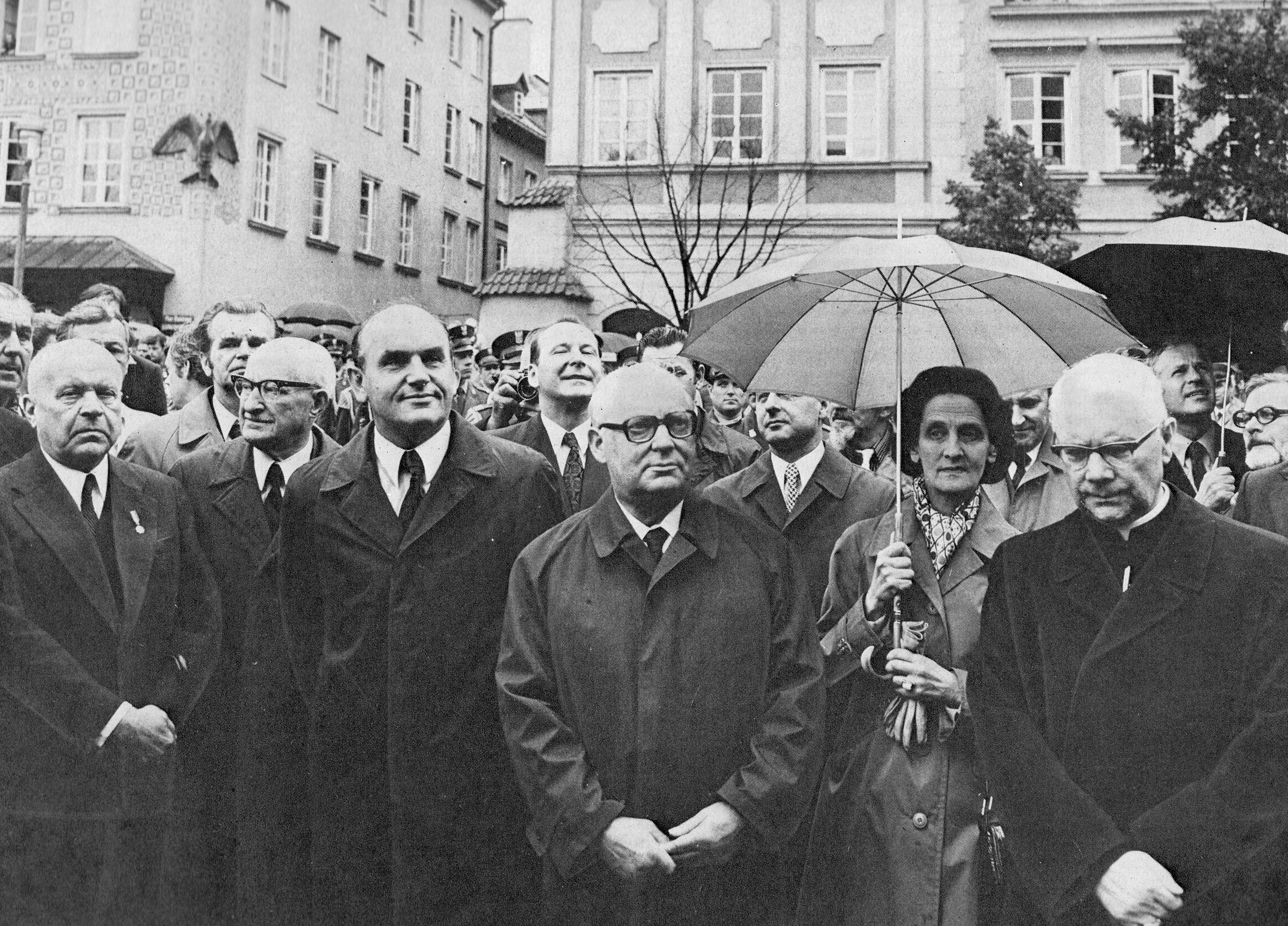 Zakończenie I etapu odbudowy Zamku Królewskiego 19 lipca 1974